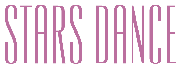 Logo dell'album Stars Dance di Selena Gomez.